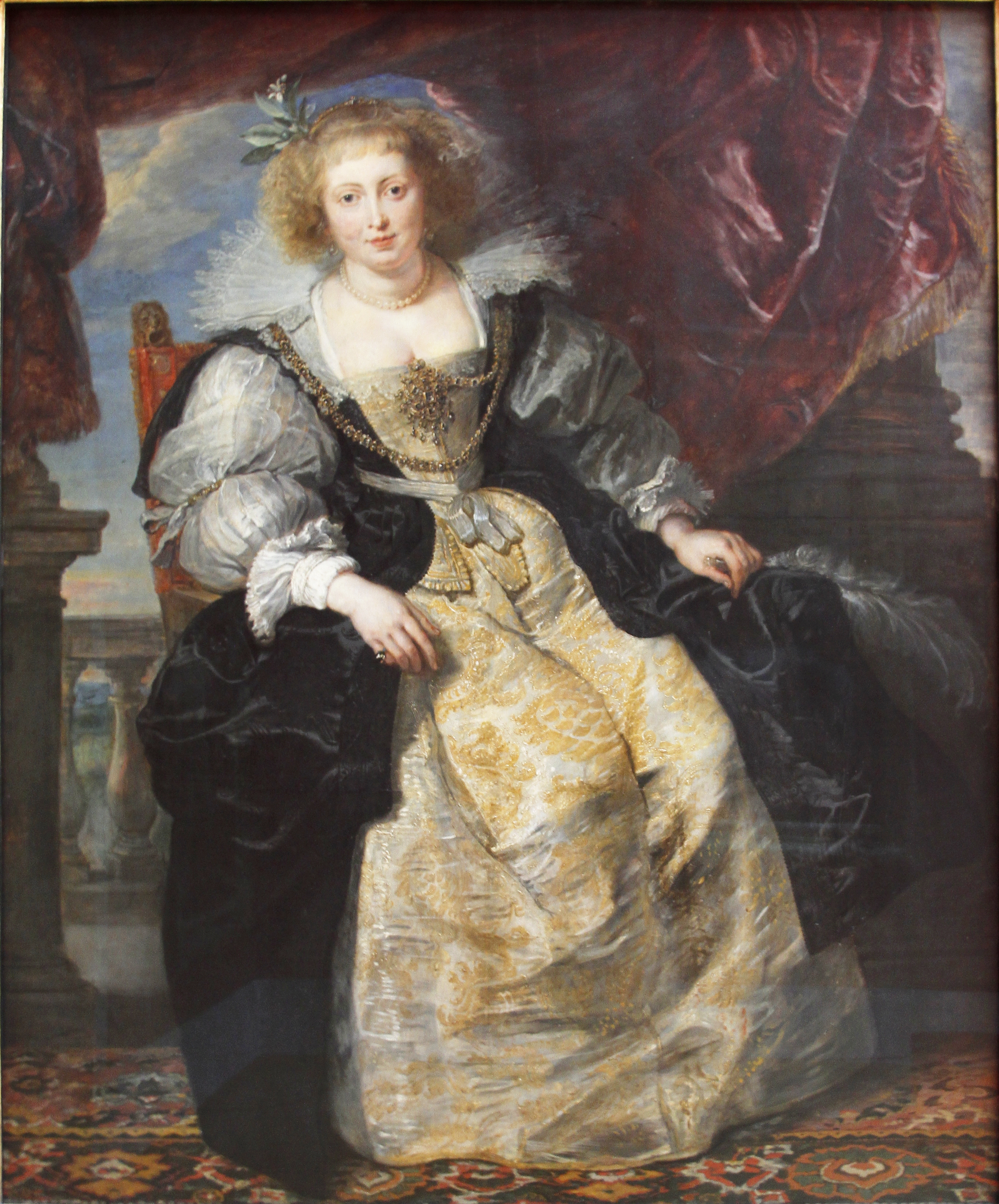 Alte Pinakothek - Munich - Germany